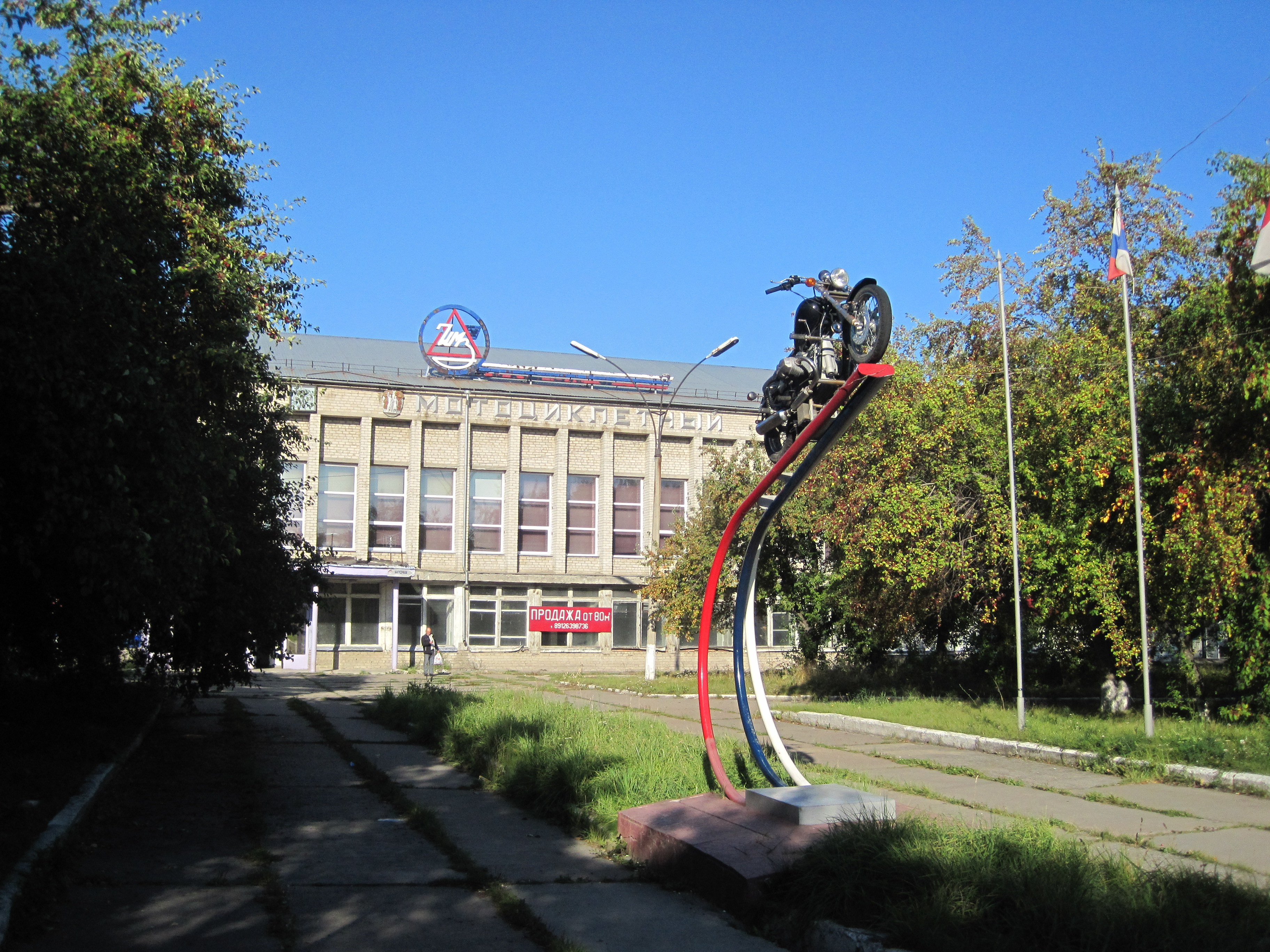 Ирбитский мотоциклетный завод - мотоцикл "Волк"